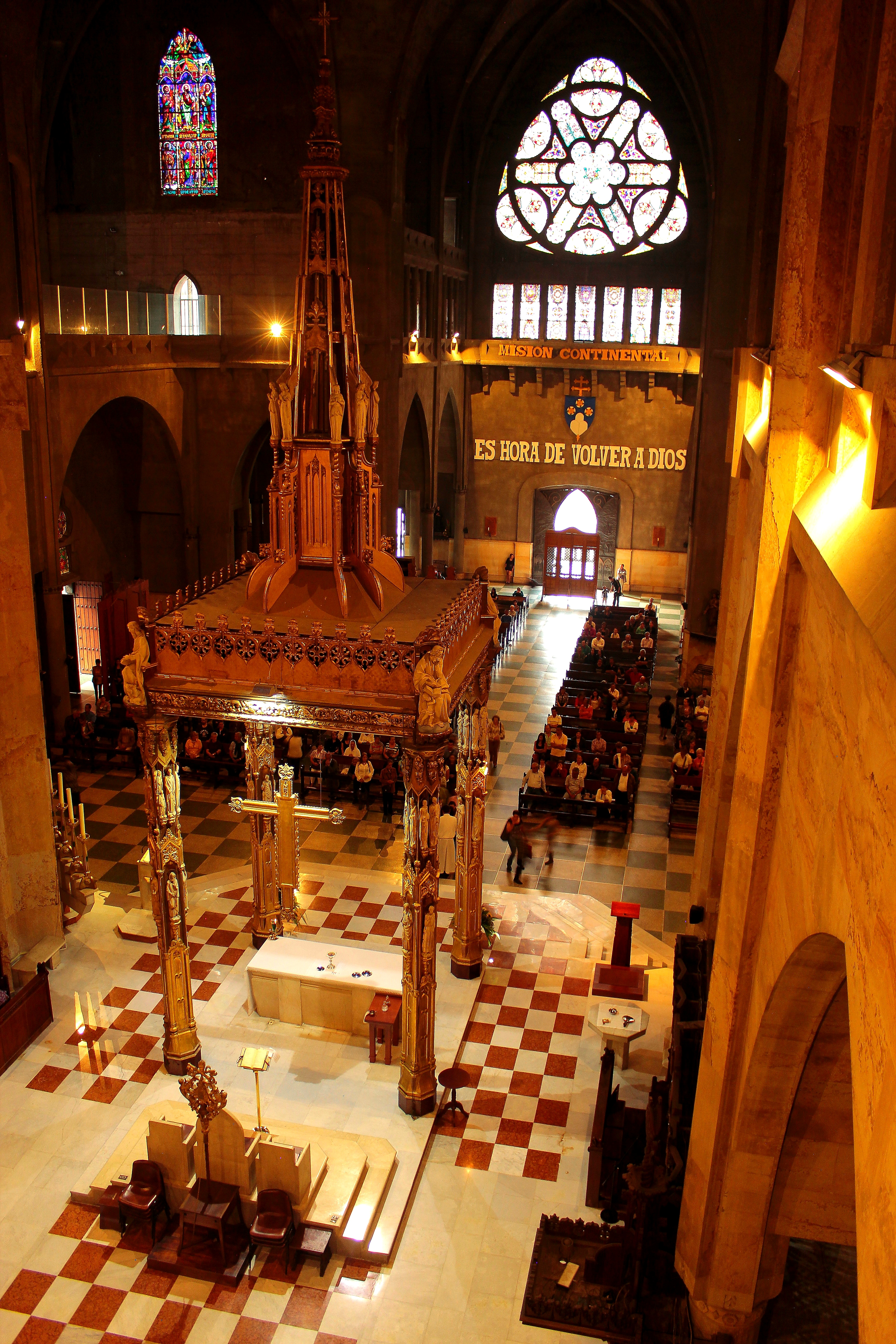 Vista interior de la Catedral de Manizales